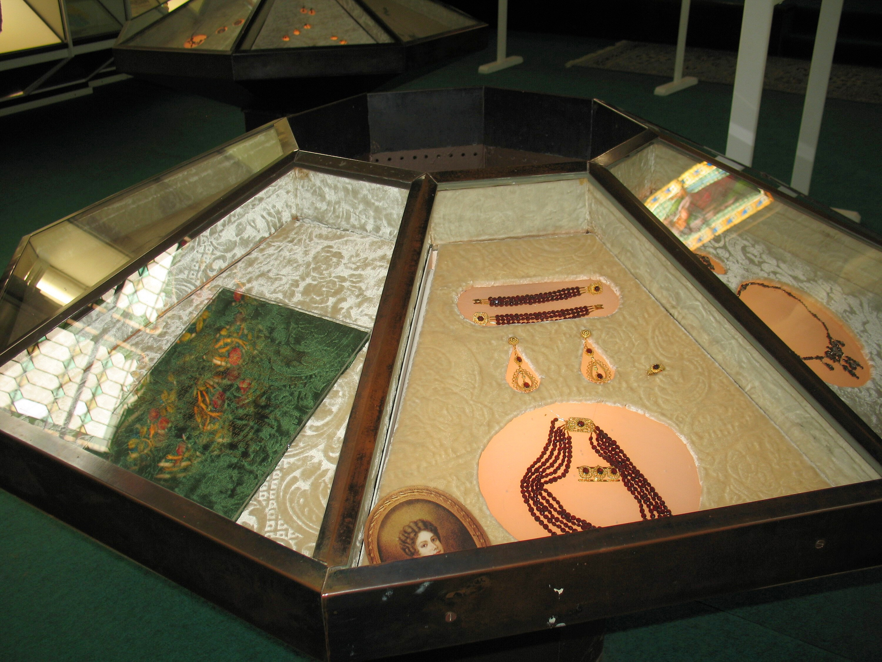 Muzeum českého granátu v Třebenicíchː vitrina s replikami šperků Ulriky von Levetzow